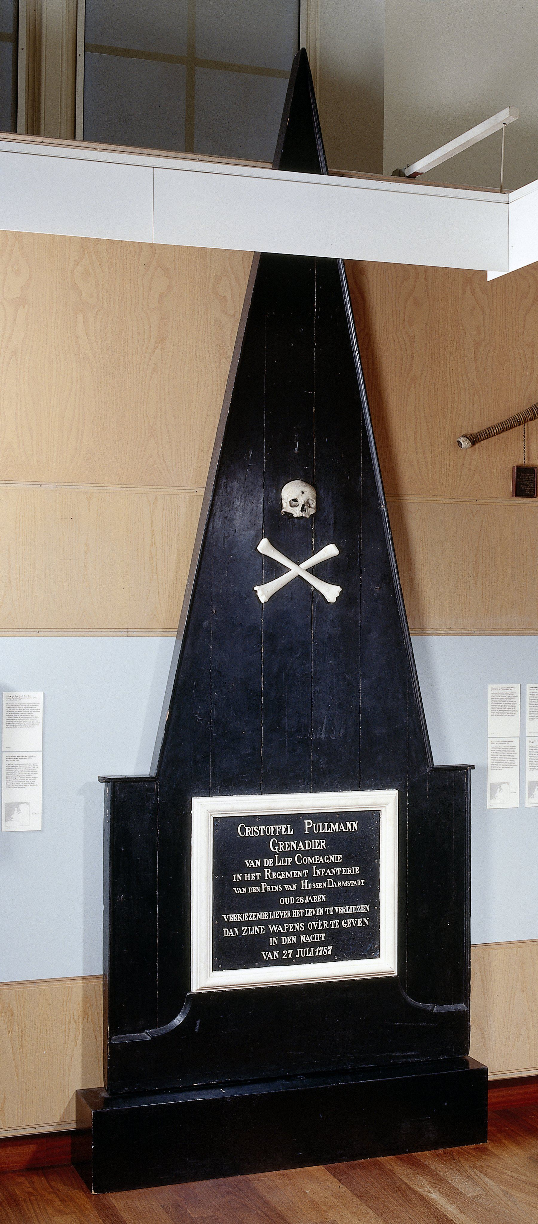 Zwart gedenkteken bestaande uit rechthoekig basis met daarop lange, hoge spits. Op basis: rechthoekig metalen paneel met witte latjes er omheen. Op paneel opschrift in witte letters (10 regels). Op spits: schedel met gat in voorhoofd boven twee gekruiste beenderen. In de nacht van 26 op 27 juli 1787 trokken patriotse troepen op vanuit Utrecht om palies Soestdijk bij verrassing te bezetten. De patriotten stuitten op twee schildwachten. Een van beiden, Cristoffel Pullmann, weigerde zich over te geven. Er volgde een gevecht waarin Pullmann doodgeschoten werd. Zijn geschreeuw en het schieten allarmeerden de troepen op Soestdijk. Zij konden nu zonder problemen de aanval afslaan. Posthuum werd voor Pullmann een monument opgericht. Op 13 september 1788 werd op de plaats waar Pullmann sneuvelde een marmeren monument opgericht, dat in de Franse tijd werd verwijderd. Na 1815 werd een nieuw monument opgericht, nu van hout. Nog vóór 1882 werd dit vervangen door een 3de monument, opnieuw van hout (deze bevindt zich nu in de collectie). In 1937 werd het monument ondergebracht in kasteel Doorwerth. Na de oorlog werd het geplaatst in het Kon. Ned. Leger- en Wapenmuseum 'Generaal Hoefer' te Leiden. In 1980 werd het overgebracht naar het RM.